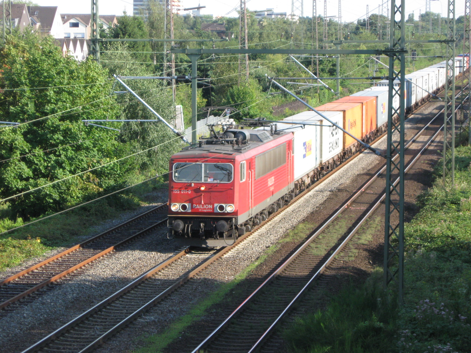 Railion 155 011 mit Güterzug in Ratingen-Lintorf auf der Bahnstrecke Troisdorf–Mülheim-Speldorf